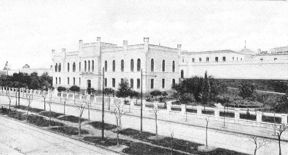 Vista desde la Avenida Las Heras de la Penitenciaría Nacional, que se hallaba en el barrio de Palermo de la ciudad de Buenos Aires (Argentina). Se construyó en 1877, según proyecto del arquitecto Ernesto Bunge, y fue demolida en 1962. Allí está hoy el Parque Las Heras.